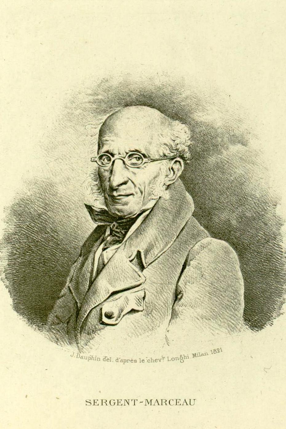 Sergent-Marceau, dessin de J. Dauphin d'après le chevalier Longhi, publié dans Le Bulletin des Beaux-Arts en 1821, Paris, École nationale supérieure des beaux-arts.